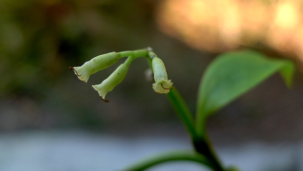 Neea laxa Poepp. & Endl.